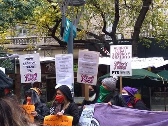 Pan y Rosas marchando bajo la consigna de Ni Una Menos (2020)